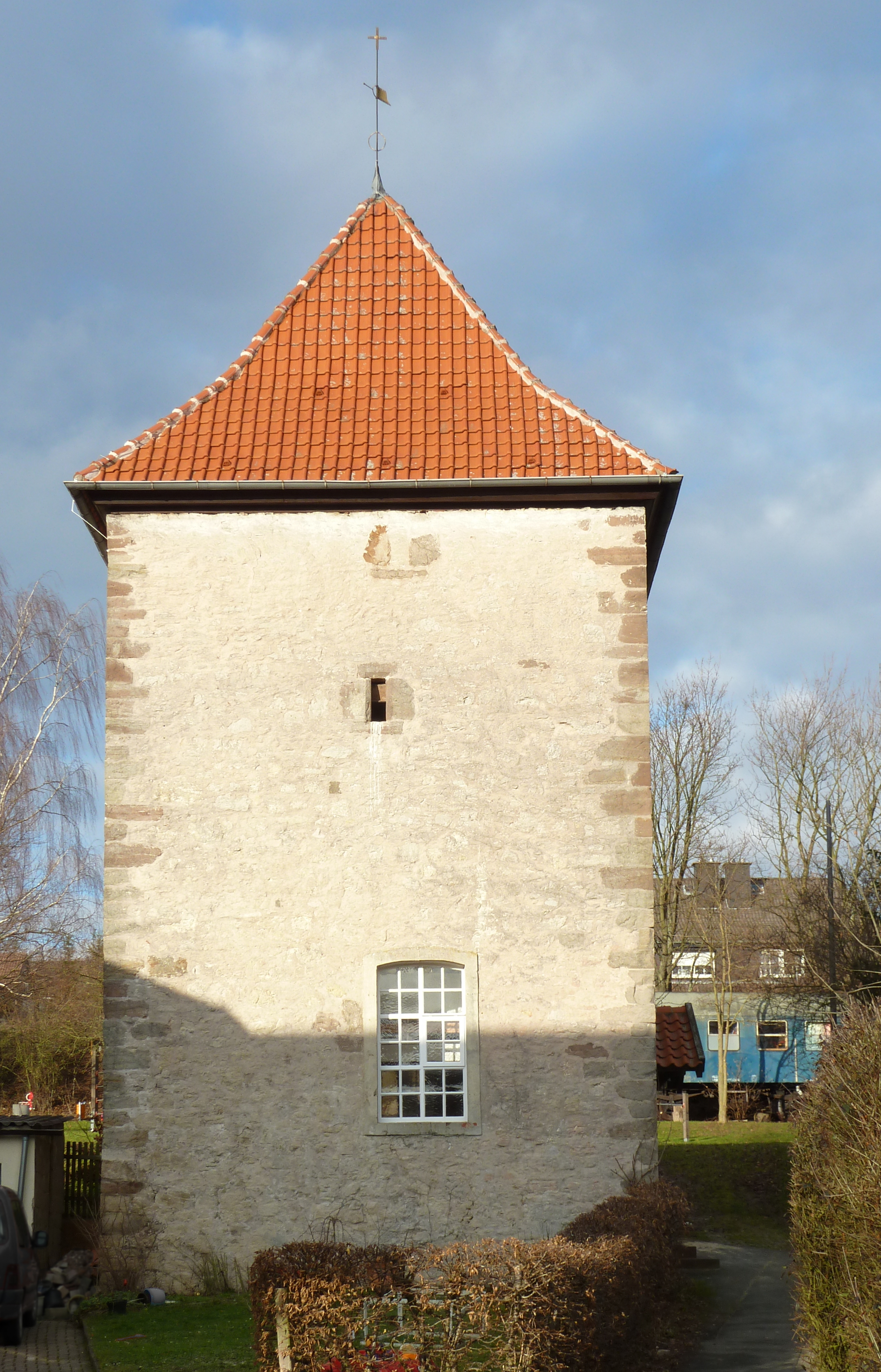 Ev.-luth. Kapelle in Klein Wiershausen, Gemeinde Rosdorf, Niedersachsen. Dreigeschossiger Turmbau von 8 mal 8 m grundfläche, Erdgeschoss ehemals überwölbt. Ansicht von Süden